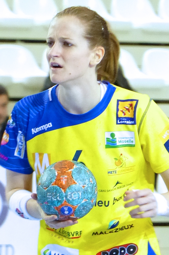 Ana Gros arrière droite de l'équipe du Metz Handball lors de la finale aller du Championnat de France face à Issy Paris Hand. Le 28 mai 2014.